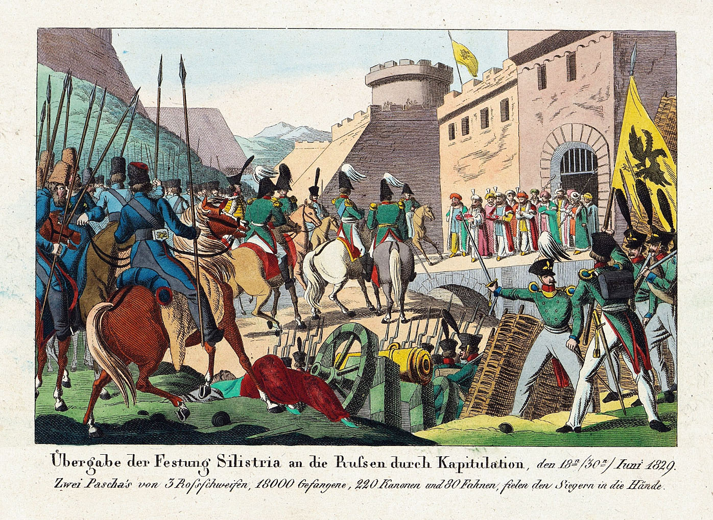 Взятие русскими Силистрии 1829 год